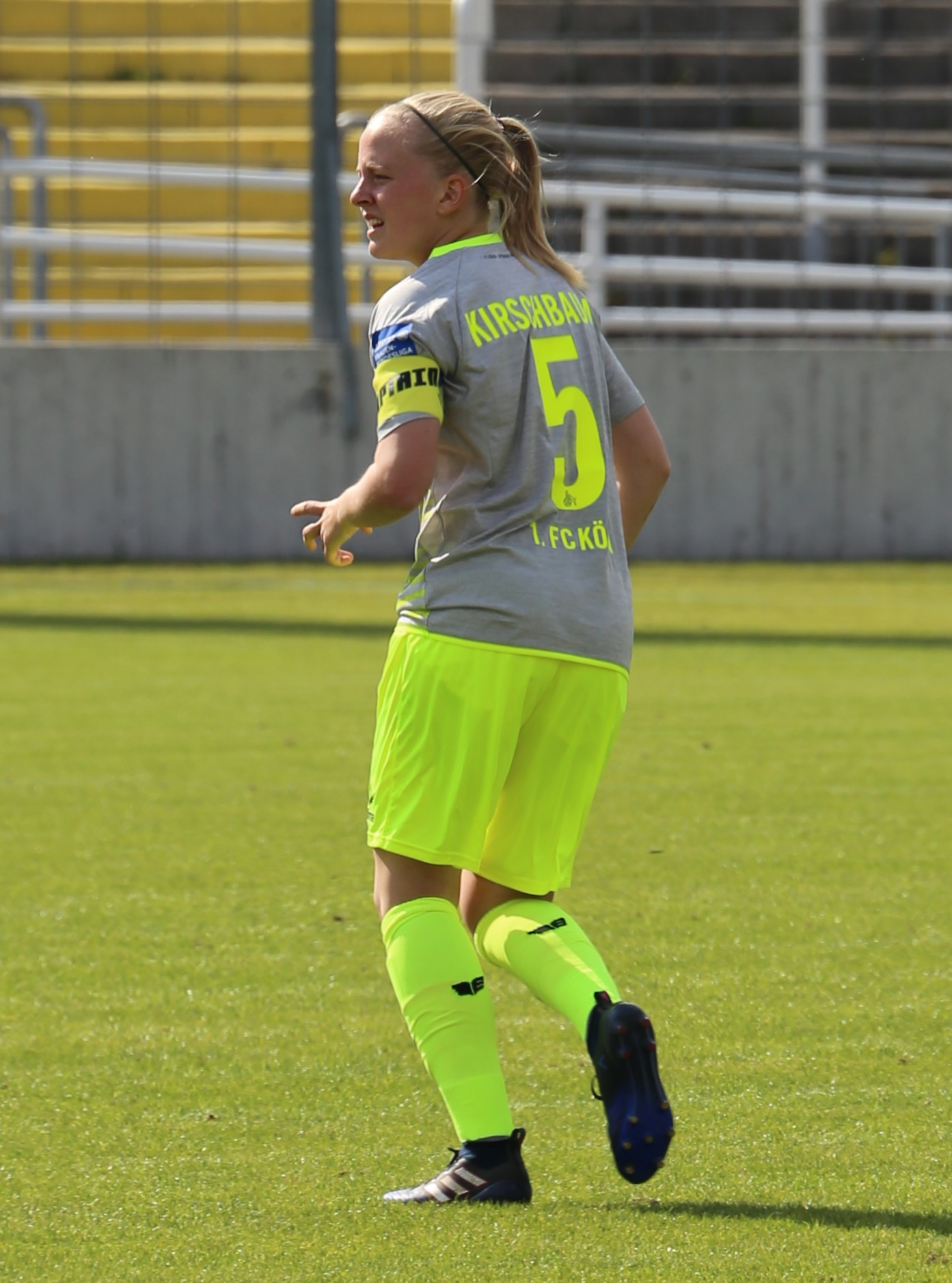 Anna Kirschbaum, 1. FC Köln, beim Frauen-Bundesliga-Spiel FC Bayern München gegen 1. FC Köln am 24. September 2017 im Stadion an der Grünwalder Straße (Ergebnis war 2:0)